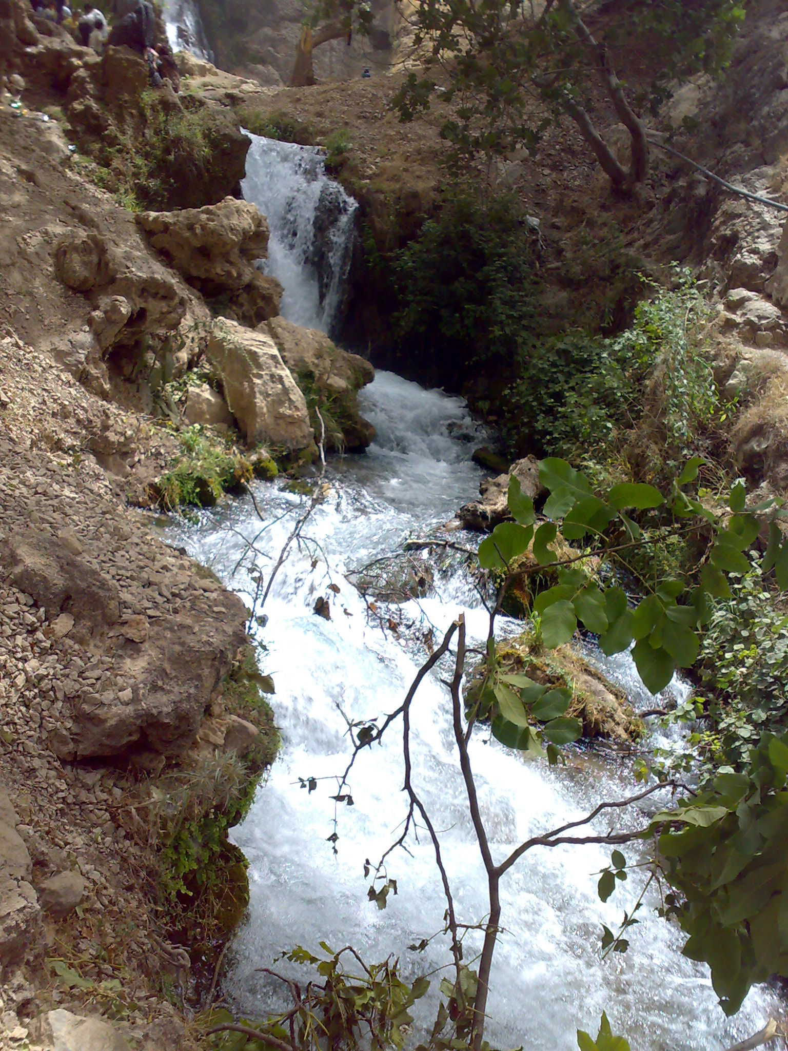 آبشار آتشگاه واقع در جنوب استان چهارمحال و بختیاری